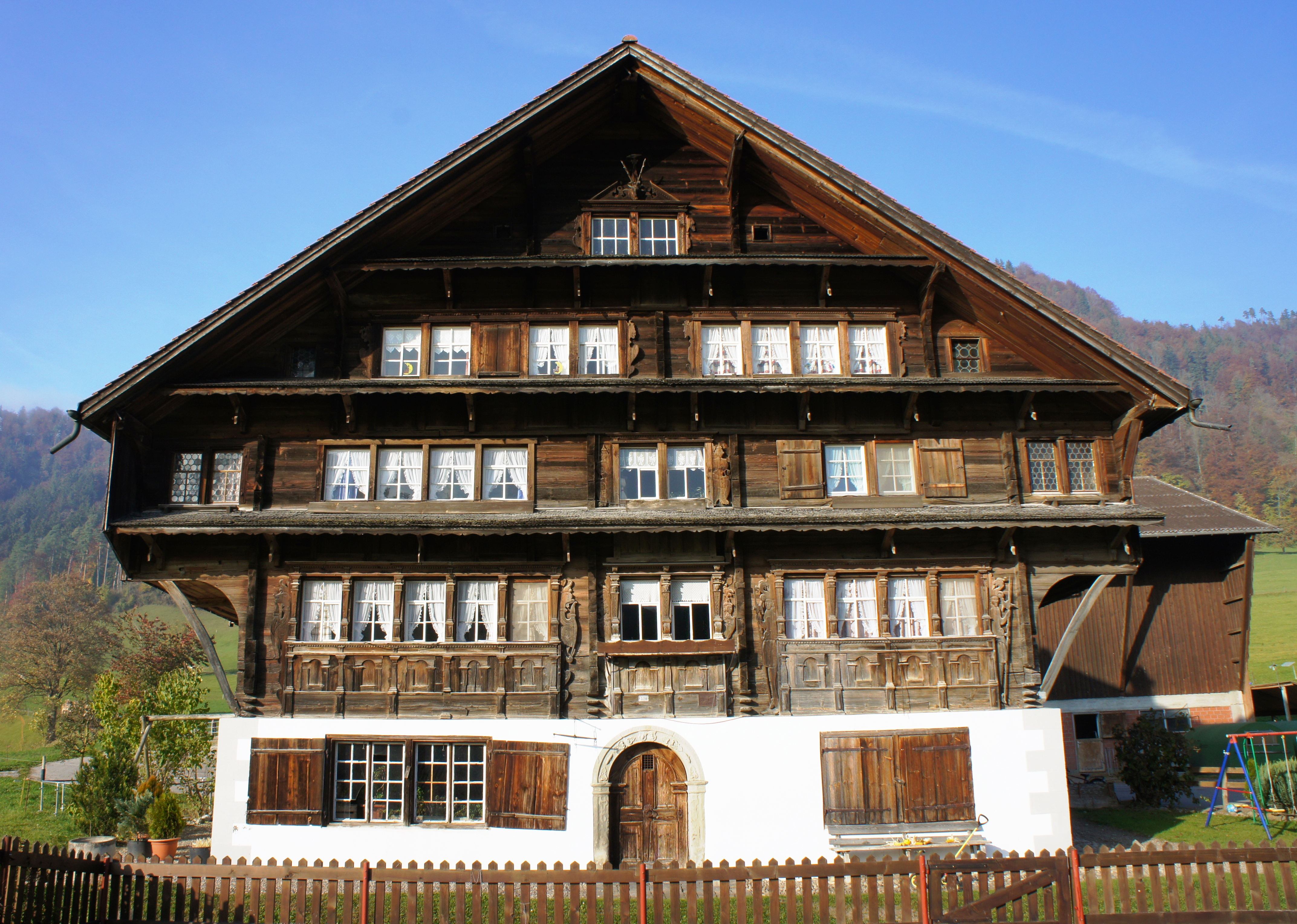 Blick von Süden auf das Haus Näf im Weiler Furt, Gemeinde Neckertal. Das Erdgeschoss ist gemauert, der obere Teil ein gestrickter Holzbau. Das Haus hat vier Stockwerke, davon zwei unter dem Dachstock. Die ersten drei Fensterreihen sind mit einer Schindel-Simse überdacht. Das zweite Stockwerk ist auf der West- und Ostseite bis unter das Vordach ausgebaut. Die Fenster in diesem Teil sind mit Butzenscheiben versehen, ebenso jeweils die beiden kleinen Fenster im darüberliegenden Stockwerk. Unter dem Giebel prangt ein Hirschgeweih. Die Fenster jeweils über dem Eingang sind mit Holzschnitzereien verziert(Doppeladler und Krieger). Der Eingang im Erdgeschoss hat einen Bogensturz. Das Kellergeschoss ist weiss verputzt, das Holz im oberen Teil ist naturbelassen dunkelbraun.